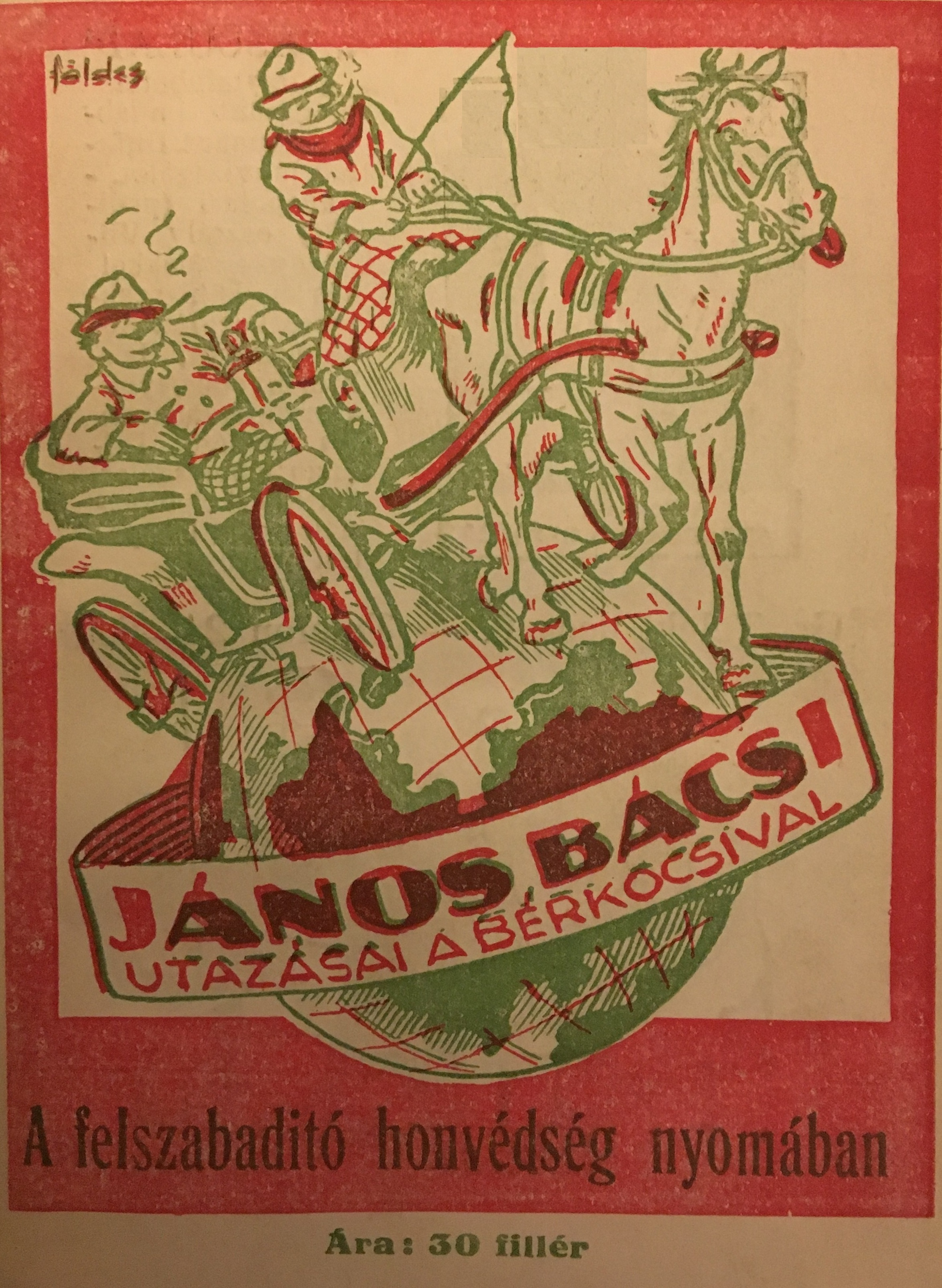 Könyvborító